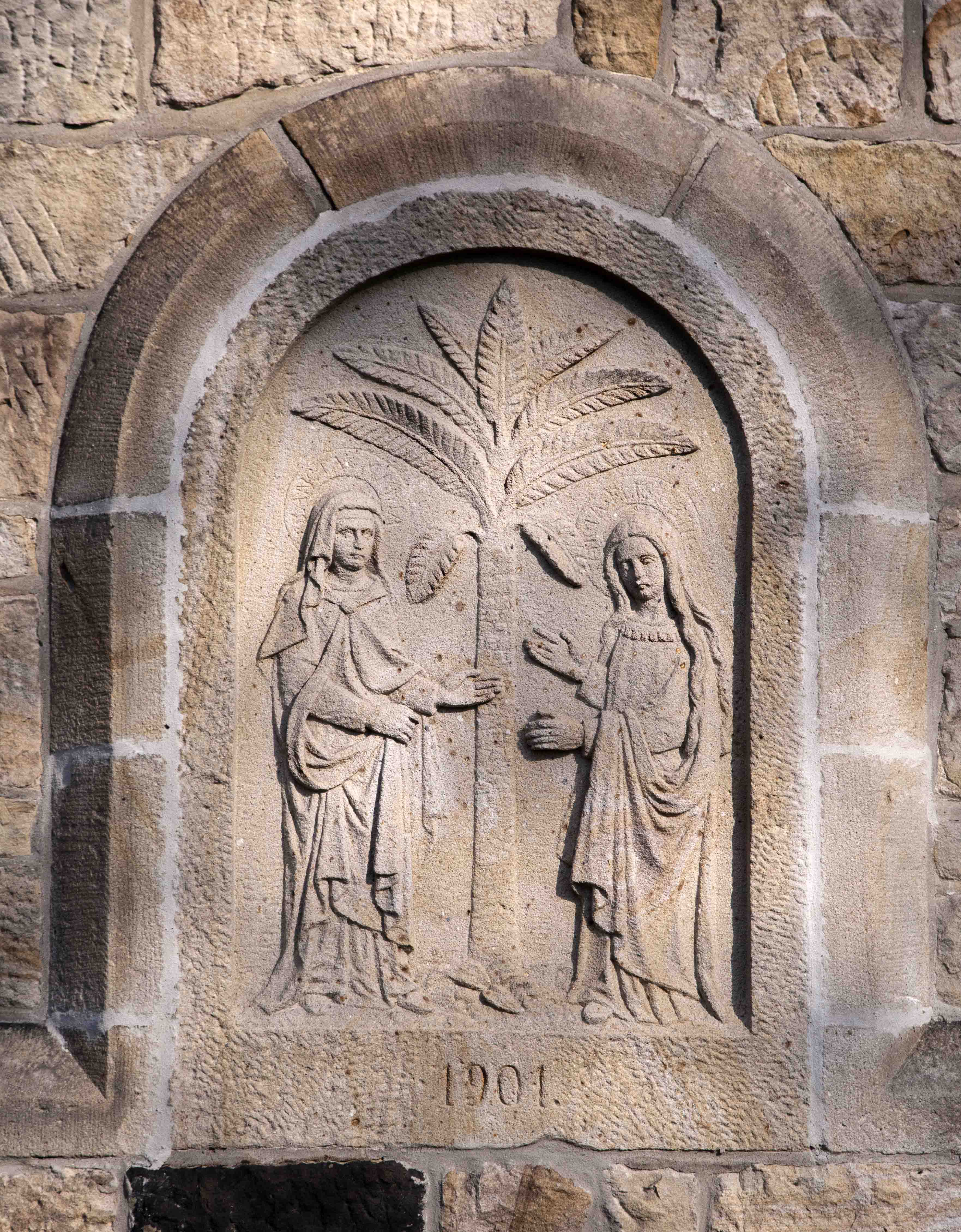 Weihestein - St. Maria Heimsuchung, Hauenhorst